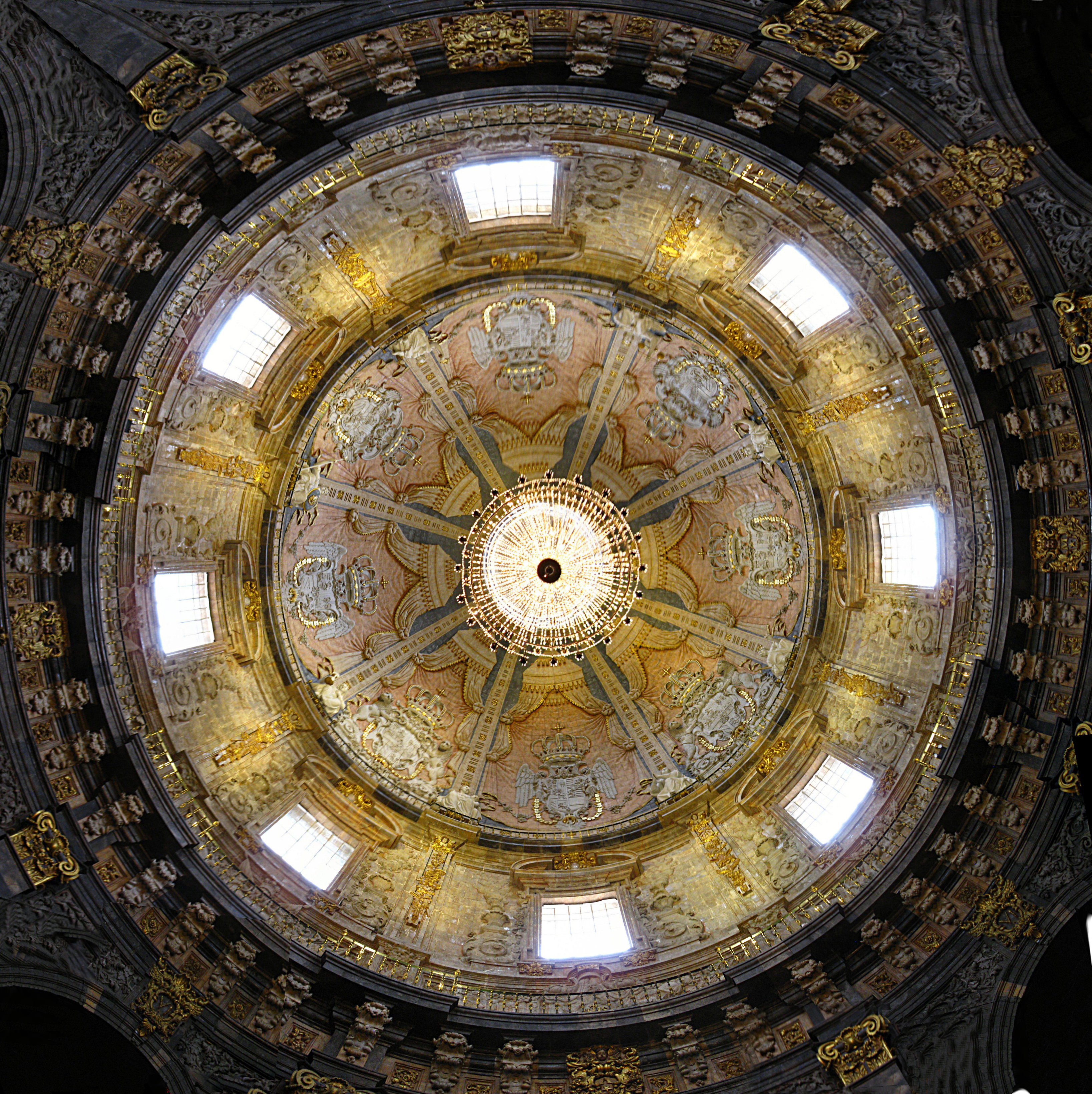 Coupole du sanctuaire de Loyola